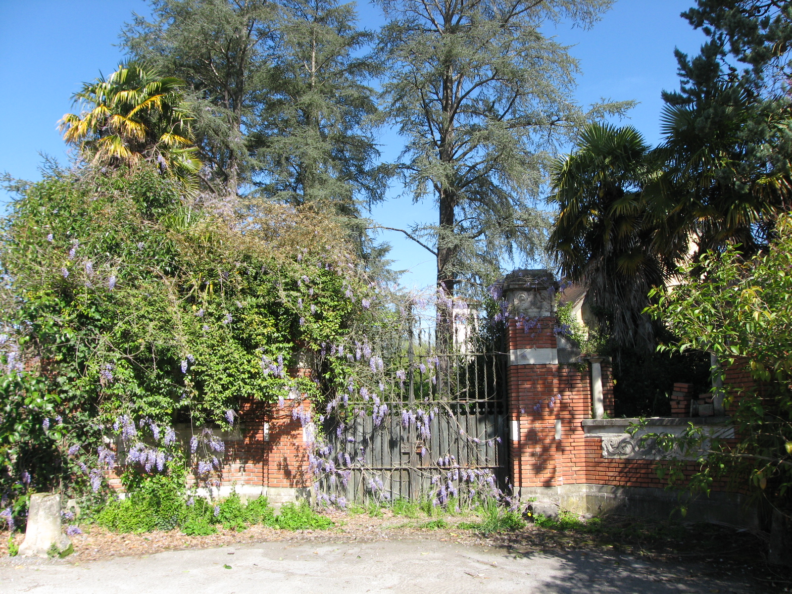 Chateau Bijou à Labastide-Villefranche (Pyrénées-Atlantiques) (Pyrénées).